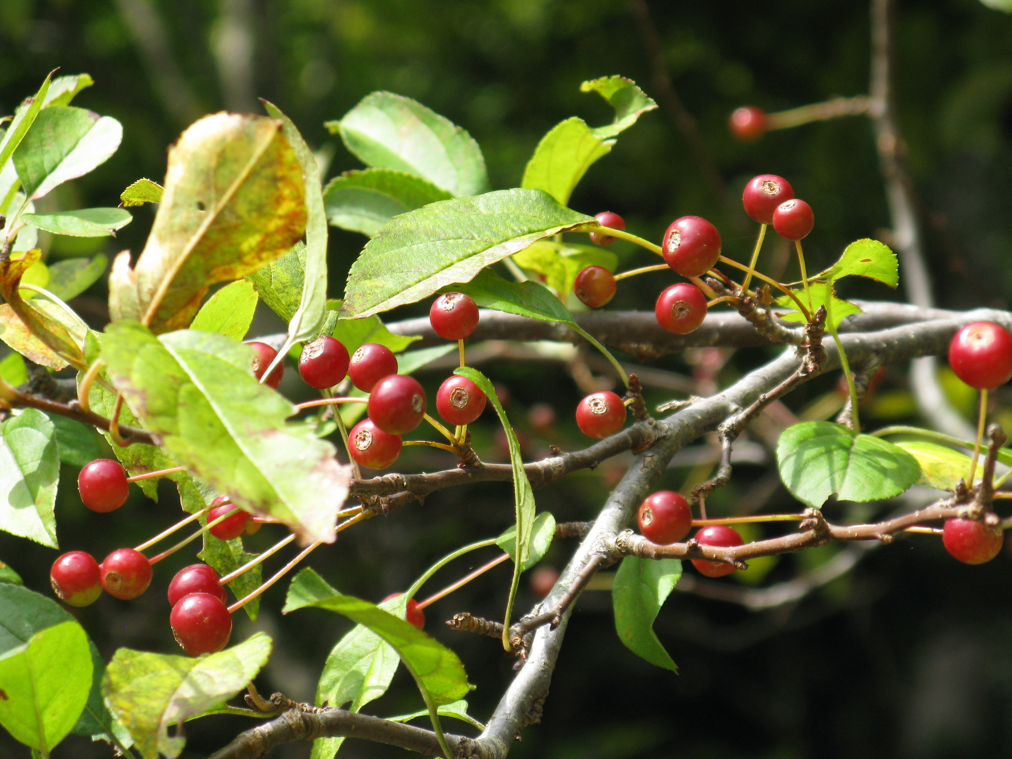 Scientific name Malus baccata var. hymalaica Place:Rokko alpine botanical garden